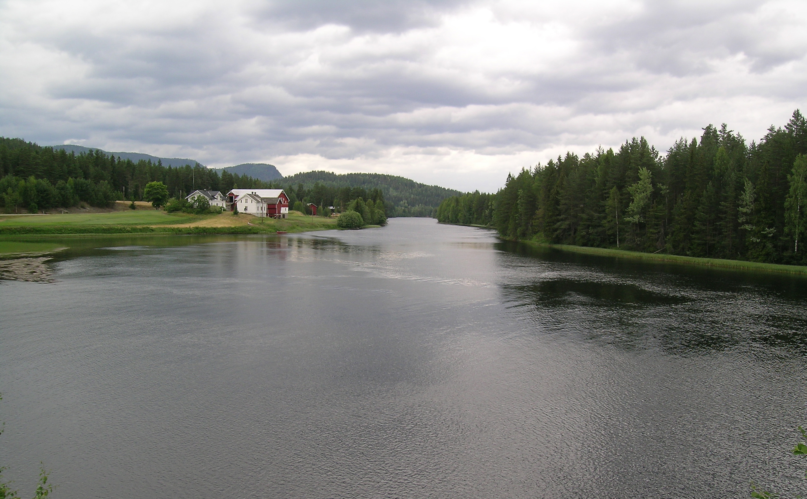 Numedalslågen.